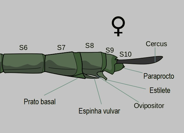 Vista lateral da porção final do abdômen da fêmea de odonata.